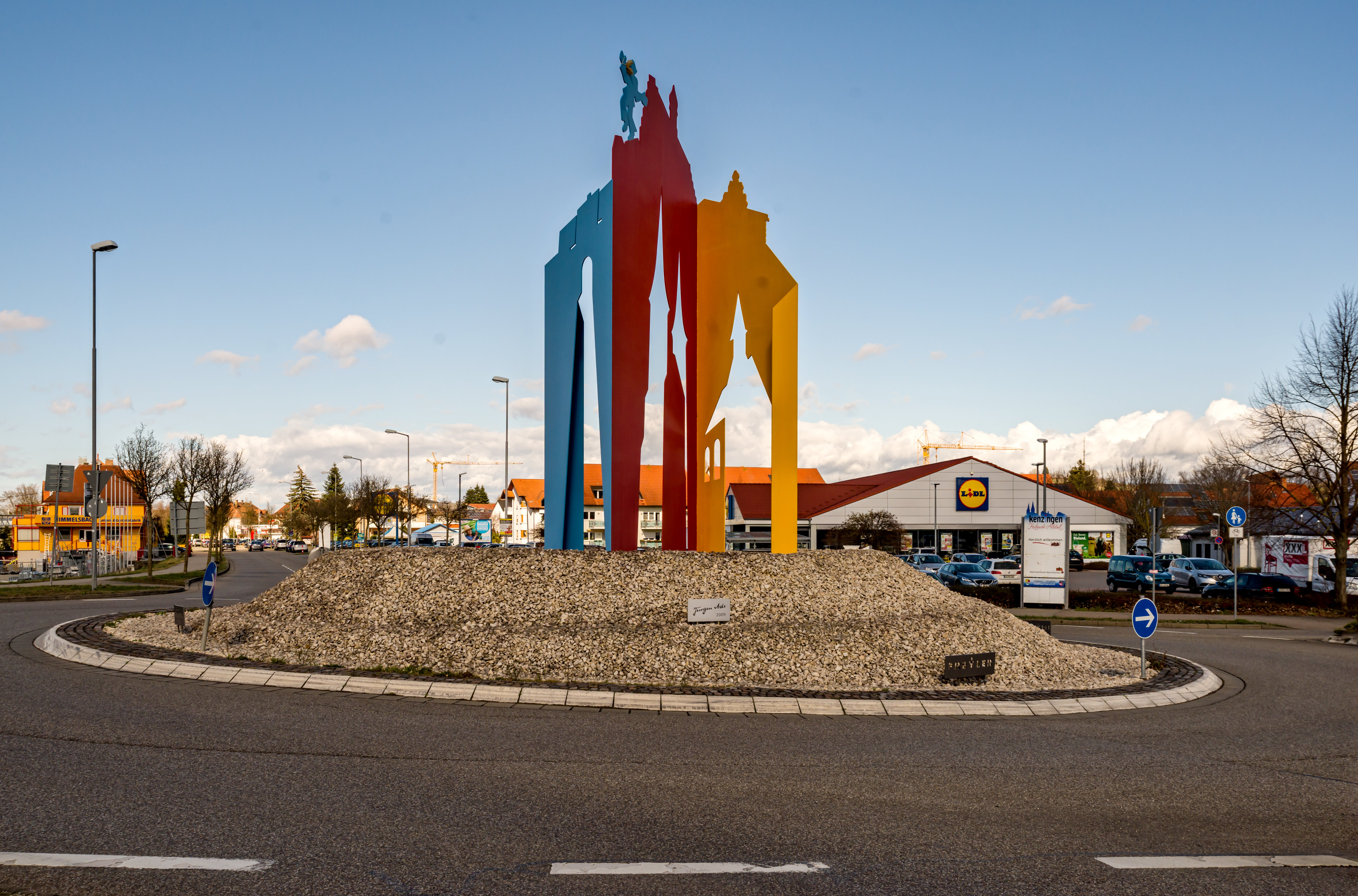 Der Kreisverkehr an der B3 am Ortseingang Süd von Kenzingen